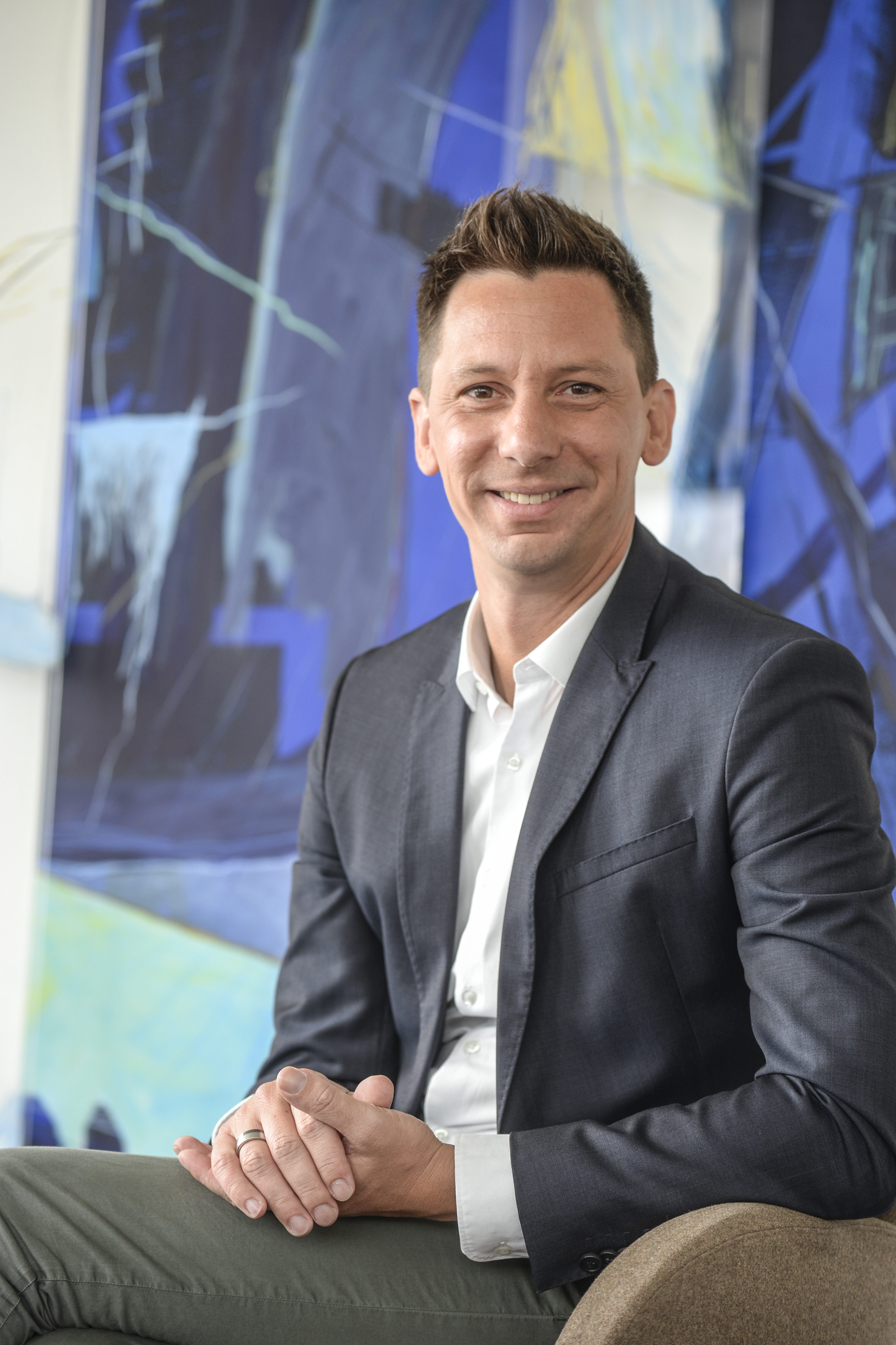 Landrat Andreas Müller in seinem Büro im Kreishaus in Siegen.